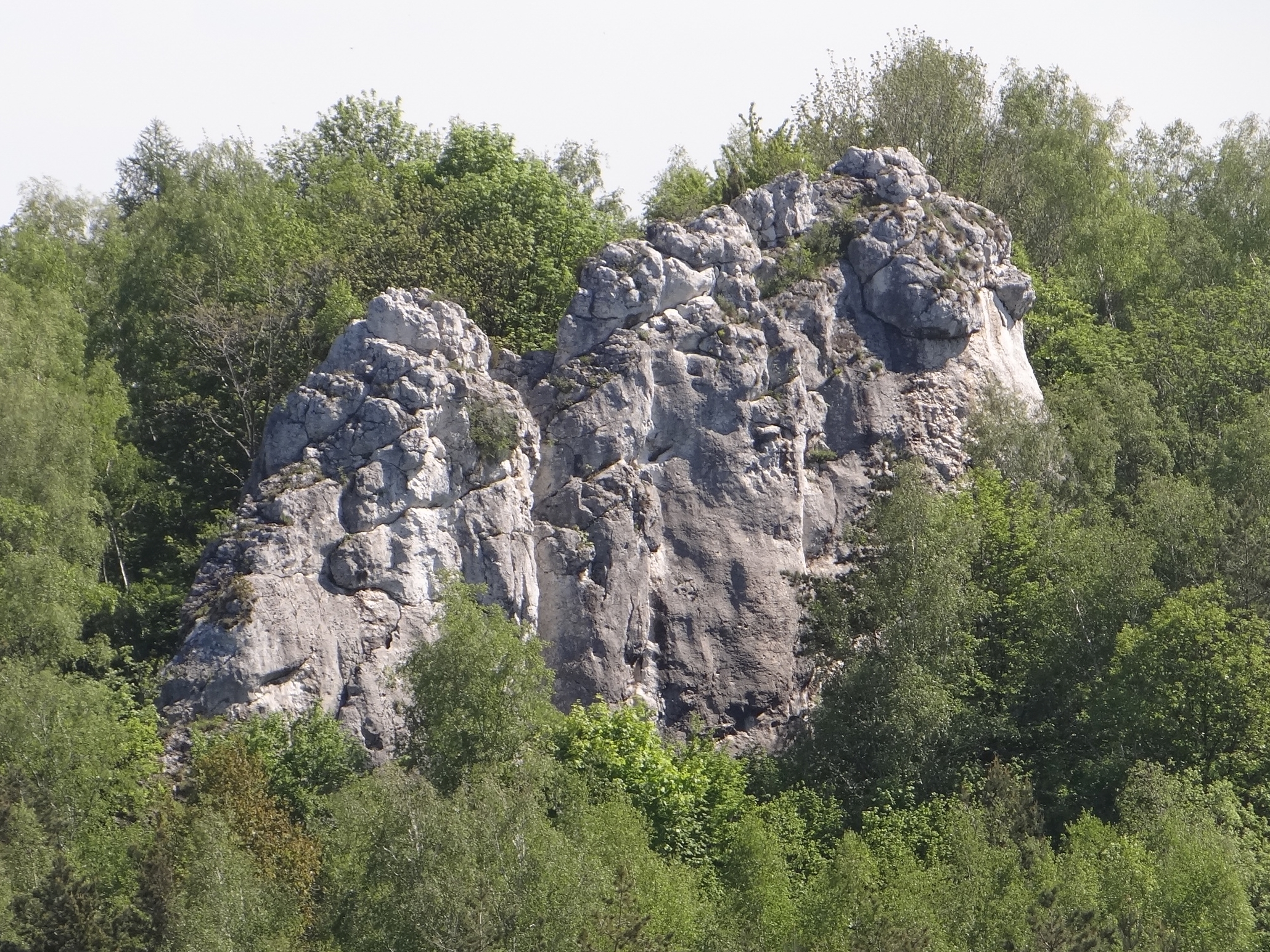 Łyse Basztyw Dolinie Szklarki